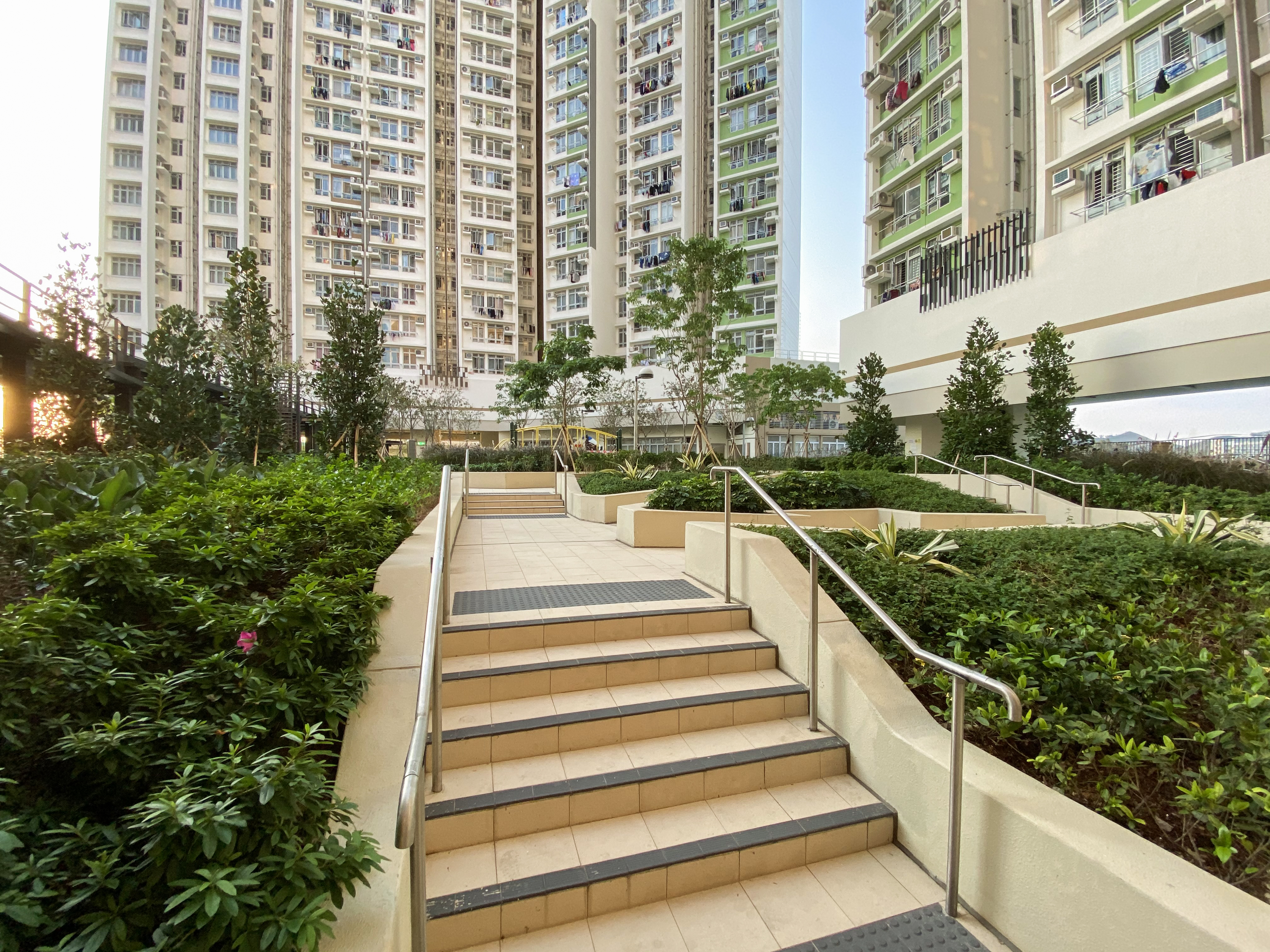 Po Shek Wu Estate Podium Garden